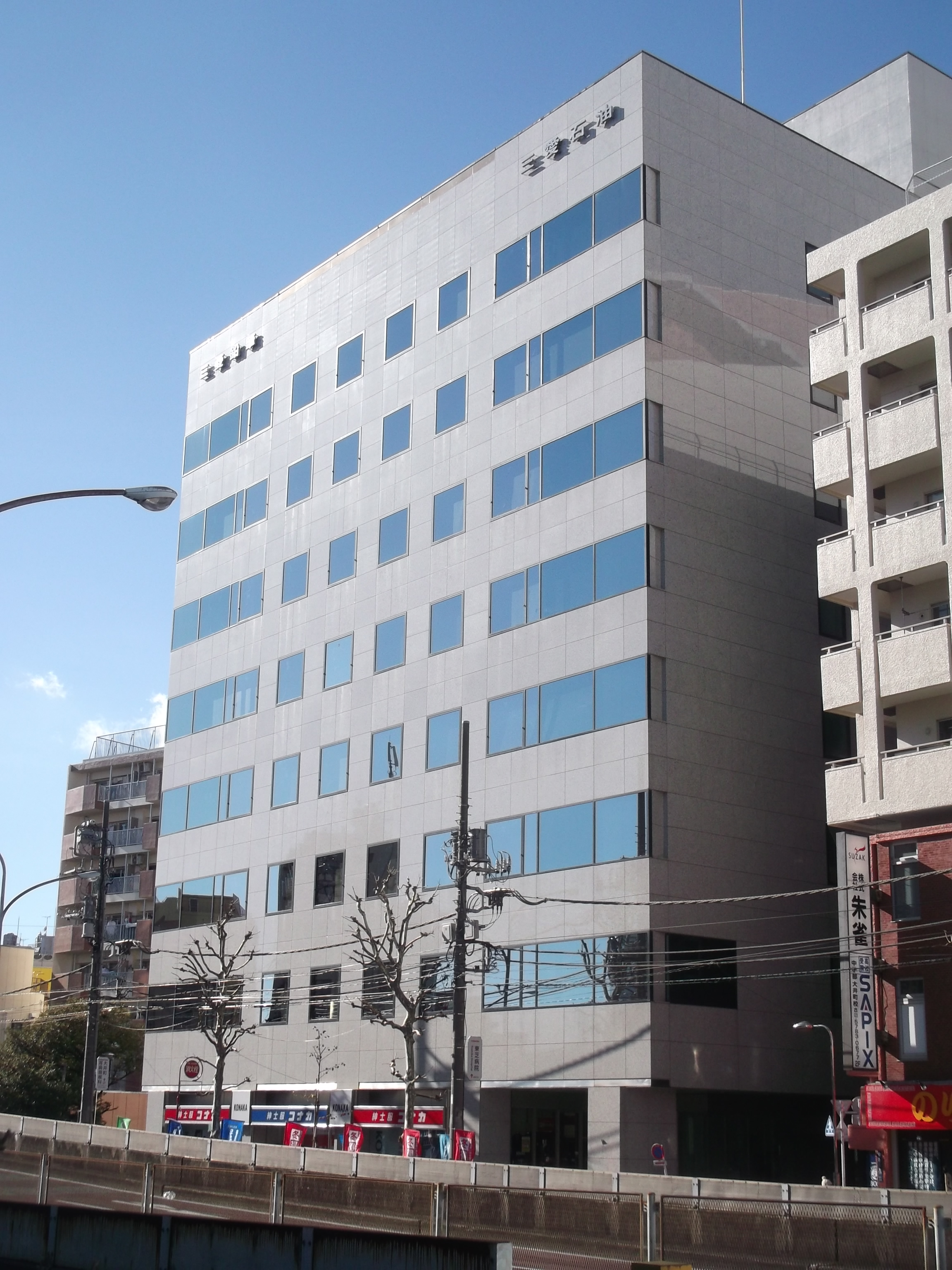 三愛石油株式会社